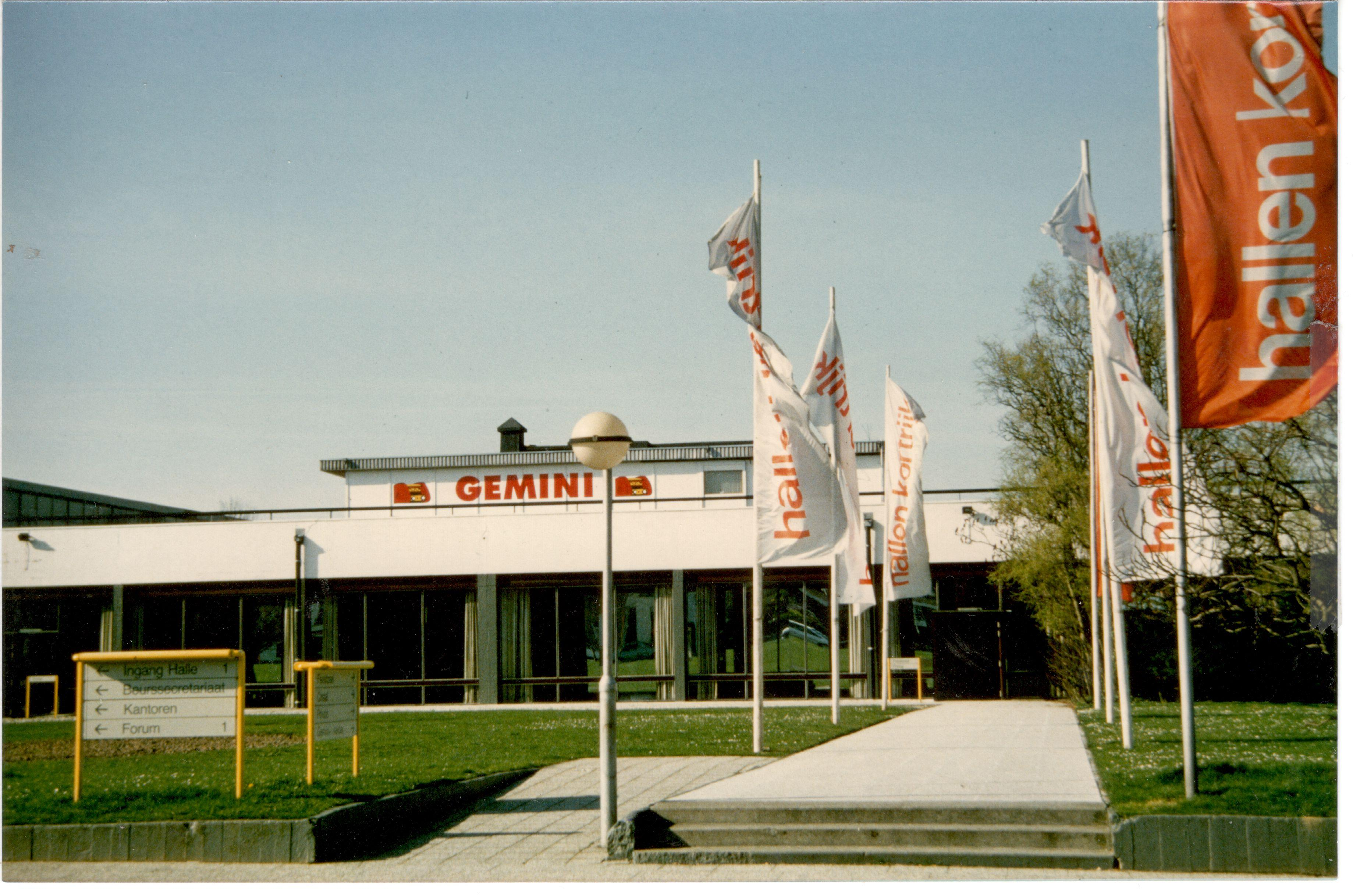 De radiostudio's van Radio Gemini in de jaren 80, bovenop de Hallen van Kortrijk (huidig Kortrijk Xpo)